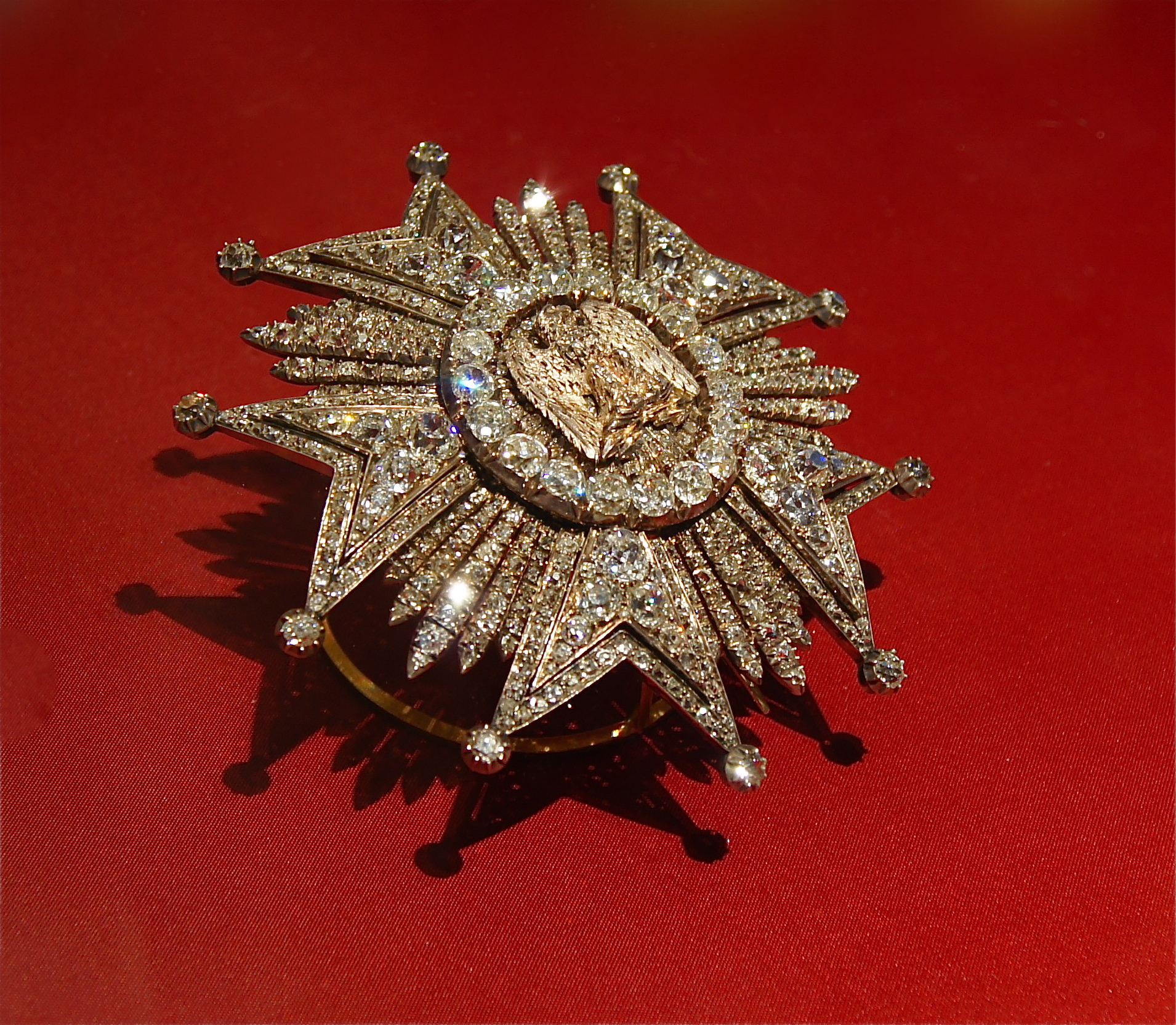 Breast plaque of Legion d'Honneur. Diamonds. French 2nd Empire. Musée National de la Légion d'Honneur et des Ordres de Chevalerie, Paris.